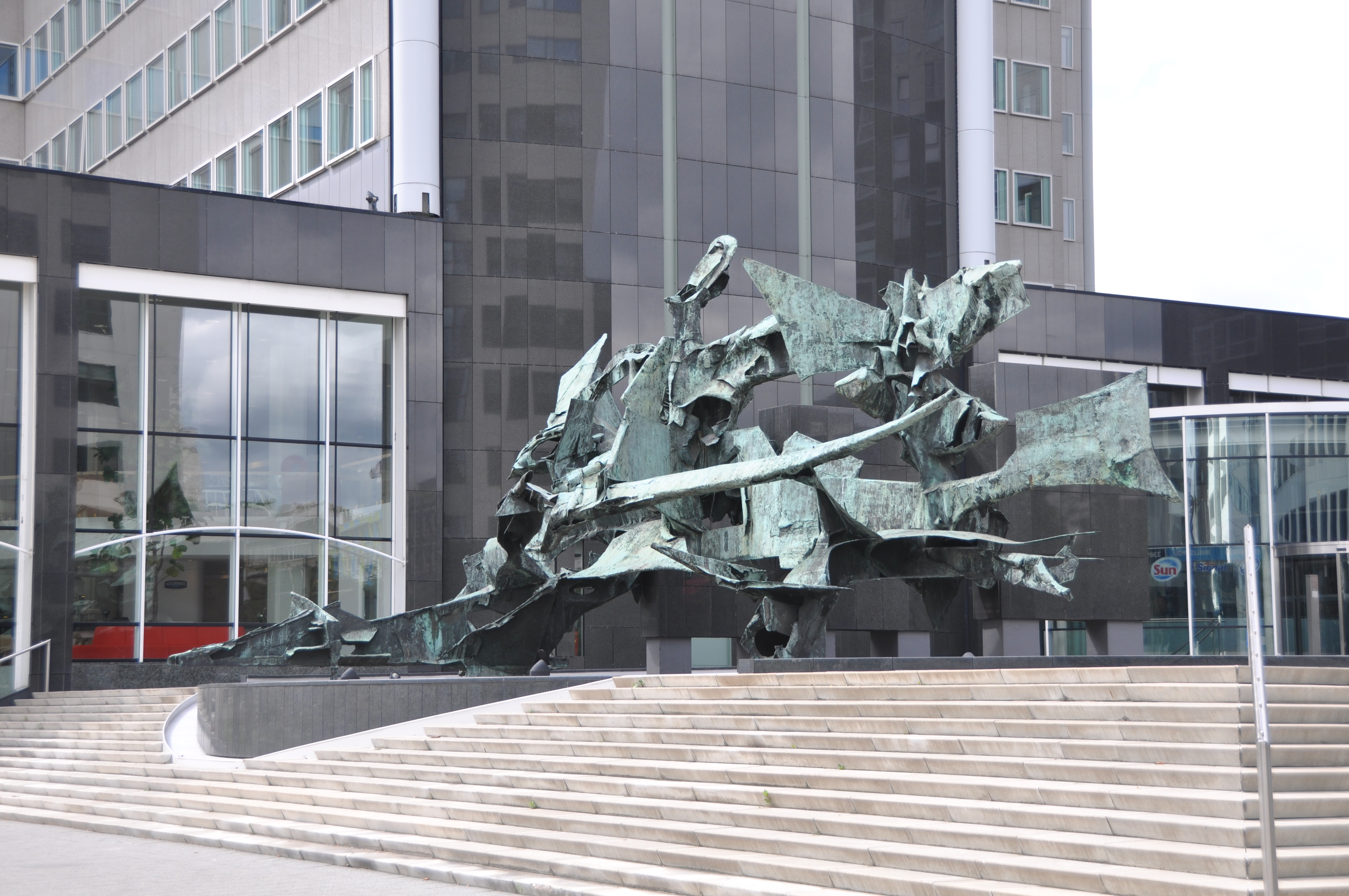 Het kunstwerk dat bij plaatsing voor het oude hoofdkantoor aan de Rochussenstraat bij veel Rotterdammers nog als symbool voor de toen nog niet zolang geleden gespeelde schrootfraude werd gekarakteriseerd.